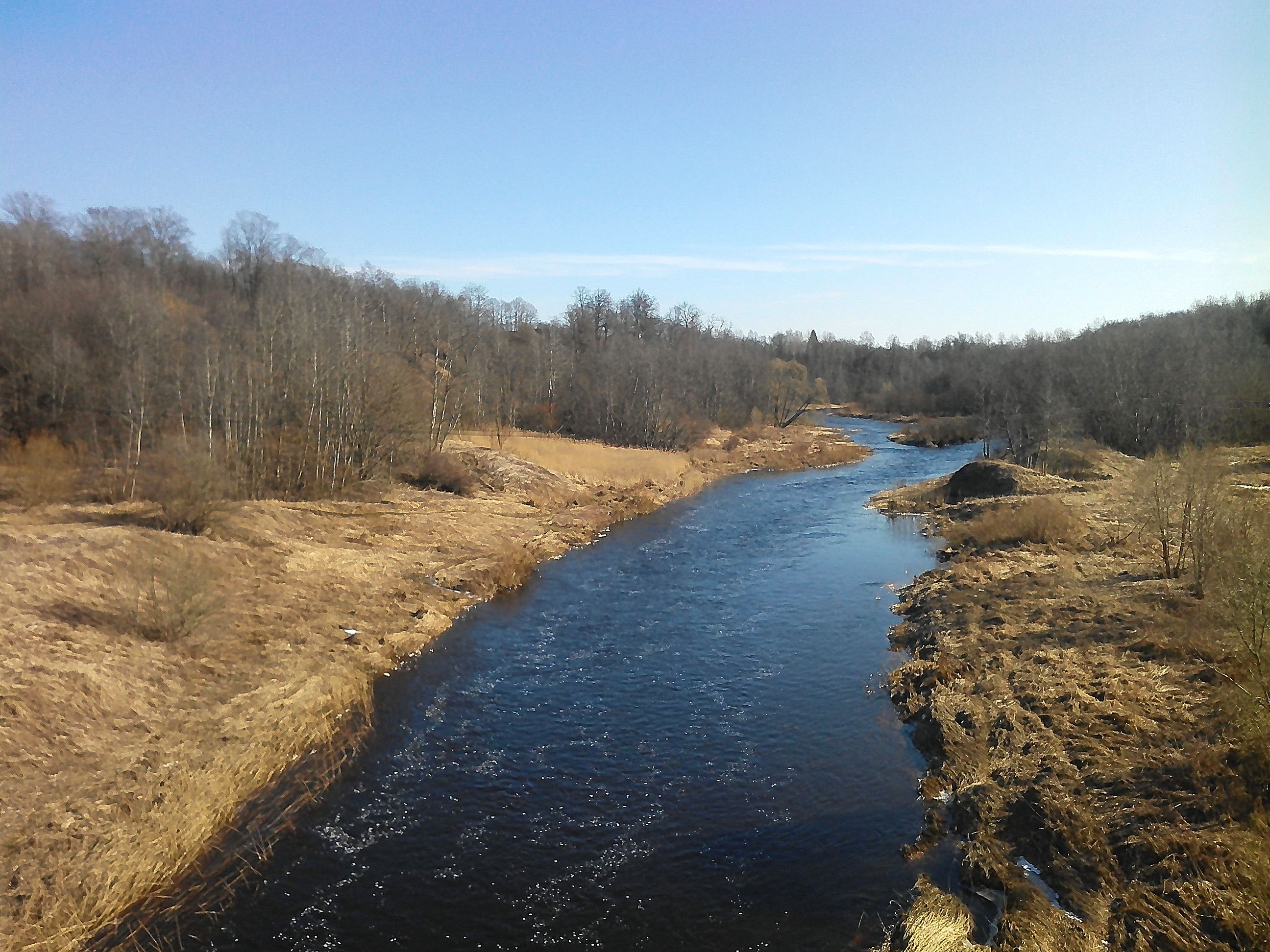 Река Тосна с моста в Ульяновке